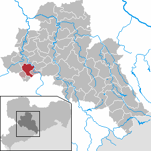 Burgstädt in Saxony - district Mittelsachsen